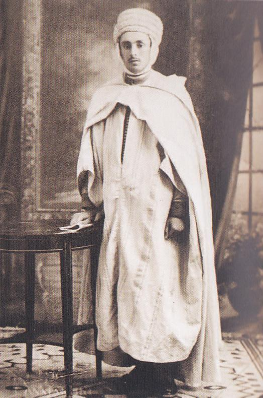 Omar Derdour en 1936